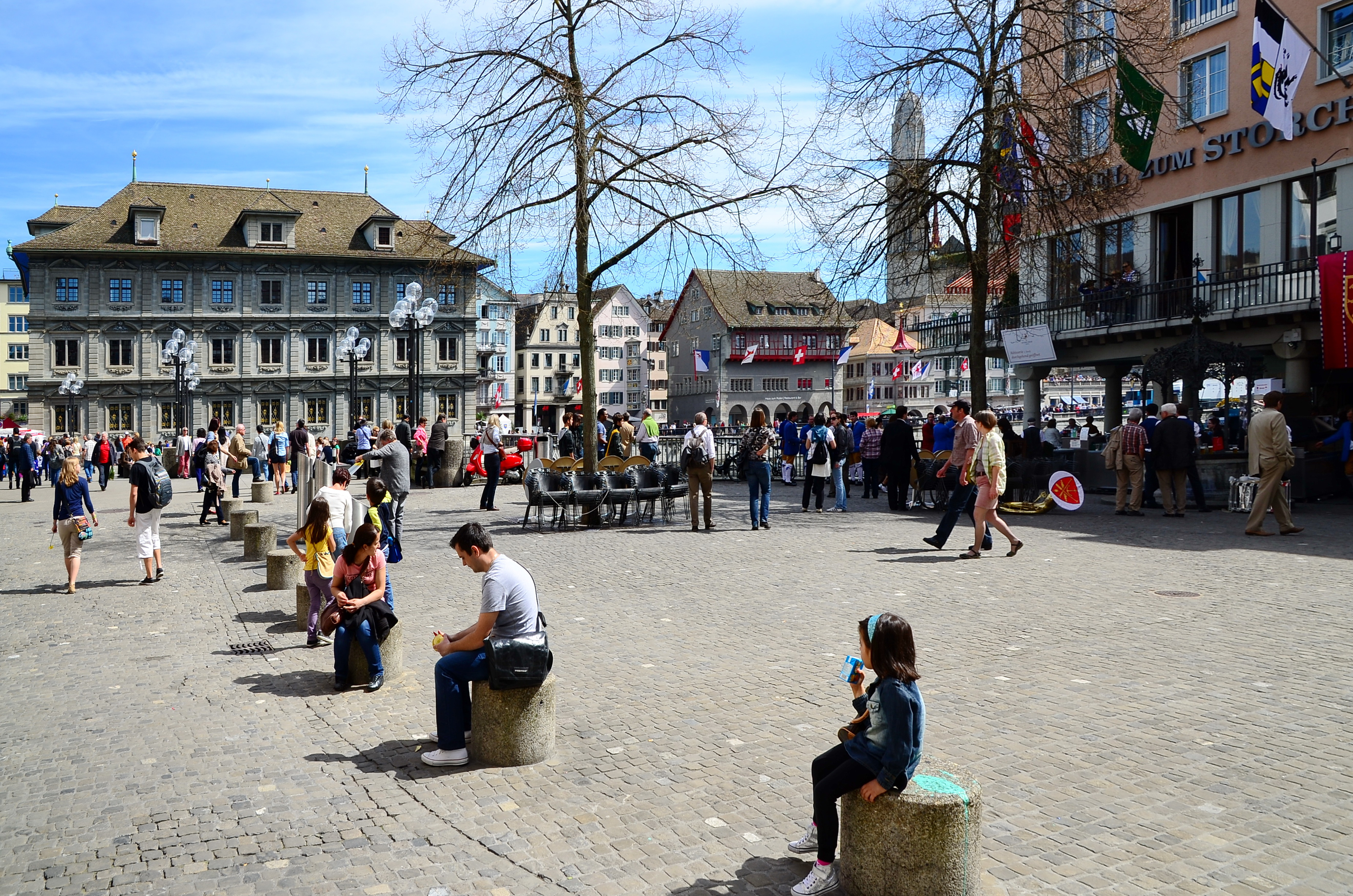 Limmatquai in Zürich (Switzerland) as seen from Weinplatz (Zürich) : Rathaus (Town hall), Zunfthaus zur Haue (the white building) and (Zunft)haus zum Rüden, all buildings decorated for Sechseläuten in April 2013.